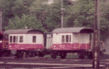 Zwei Güterzugbegleitwagen „Sputnik“ in Swiss Express Farben in Rorschach